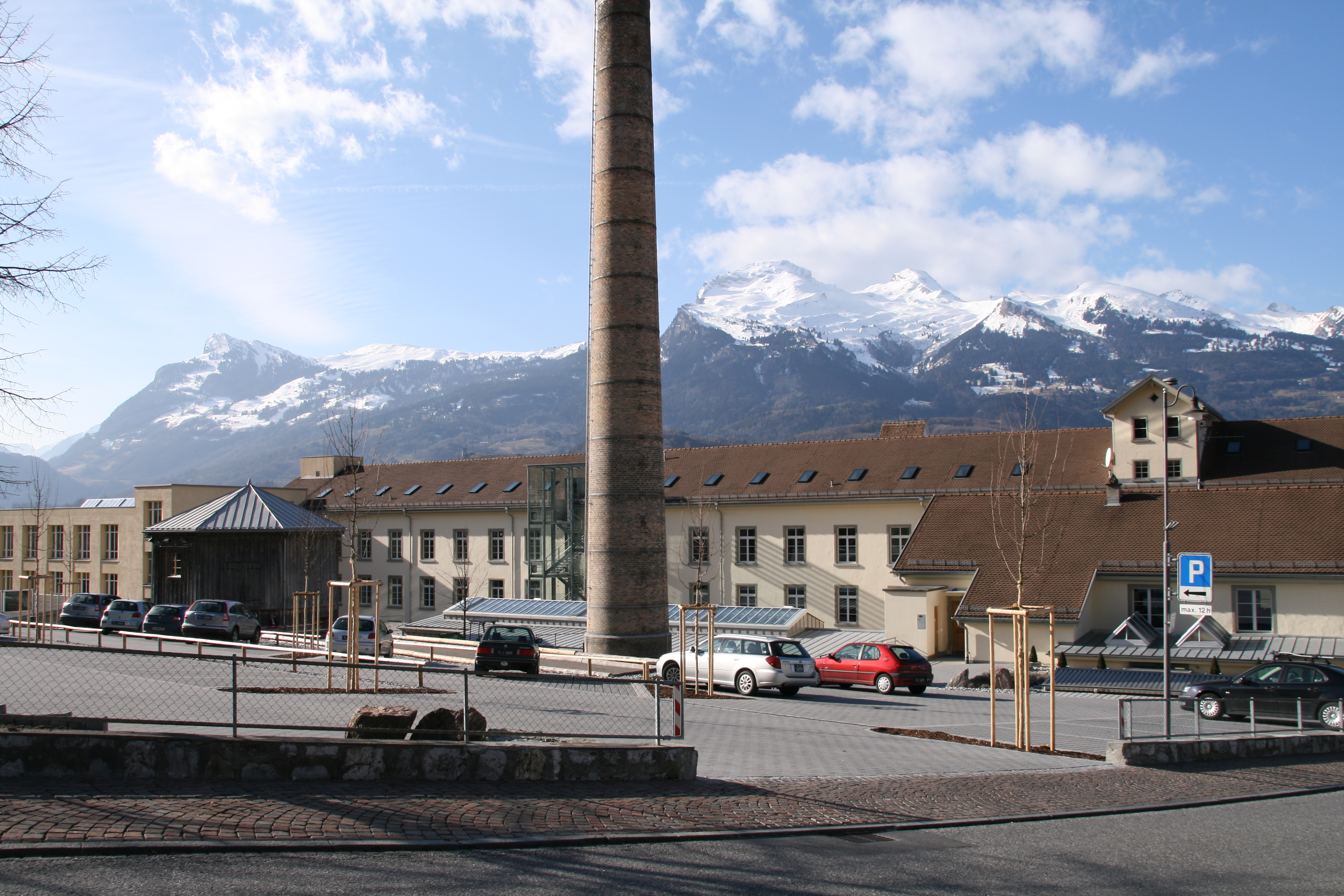 ehemalige Baumwollspinnerei Jenny, Spoerry & Cie, heute Universität für Humanwissenschaften im Fürstentum Liechtenstein (UFL) in Triesen, Liechtenstein.